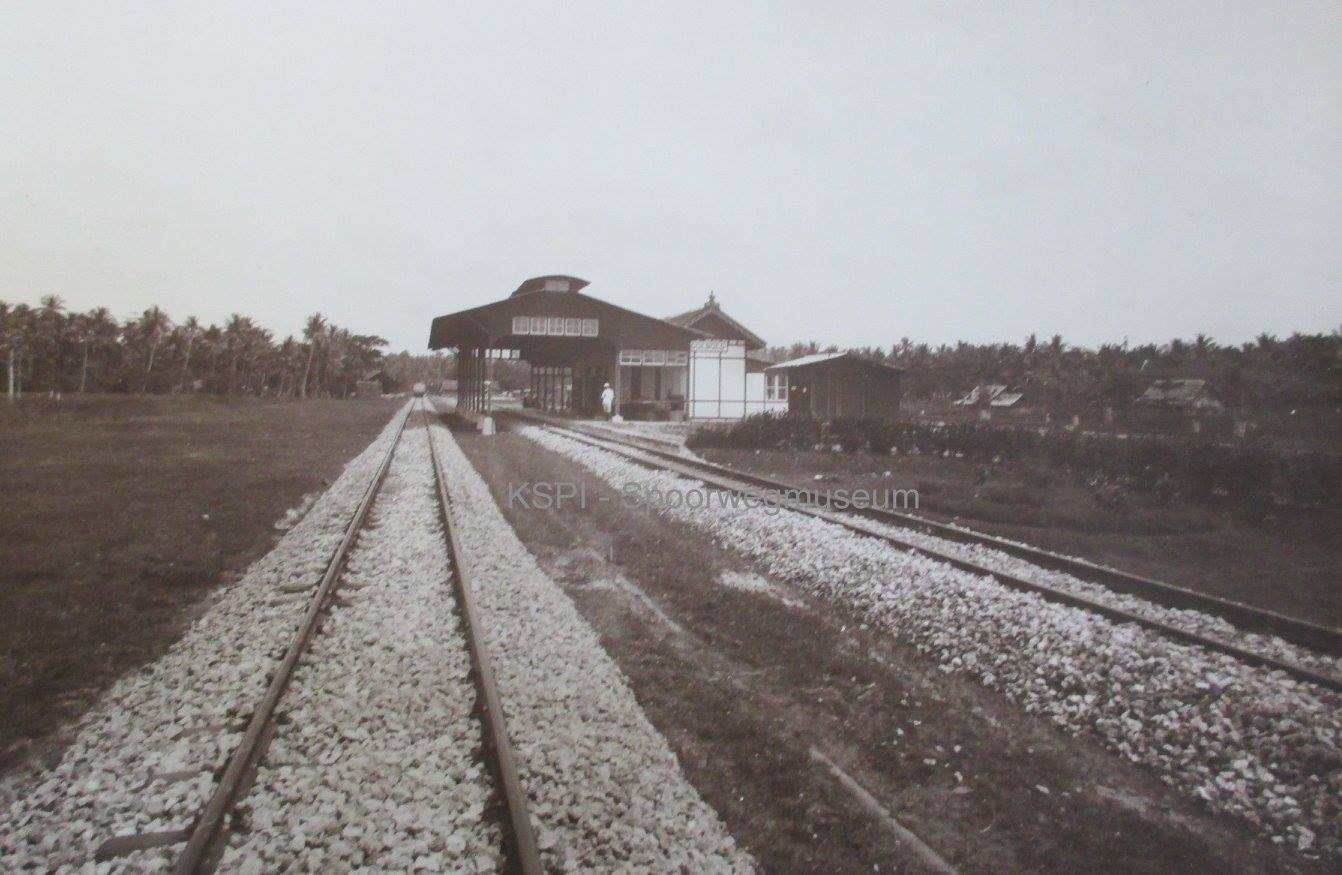 Stasiun Gubug setelah selesai dibangun.